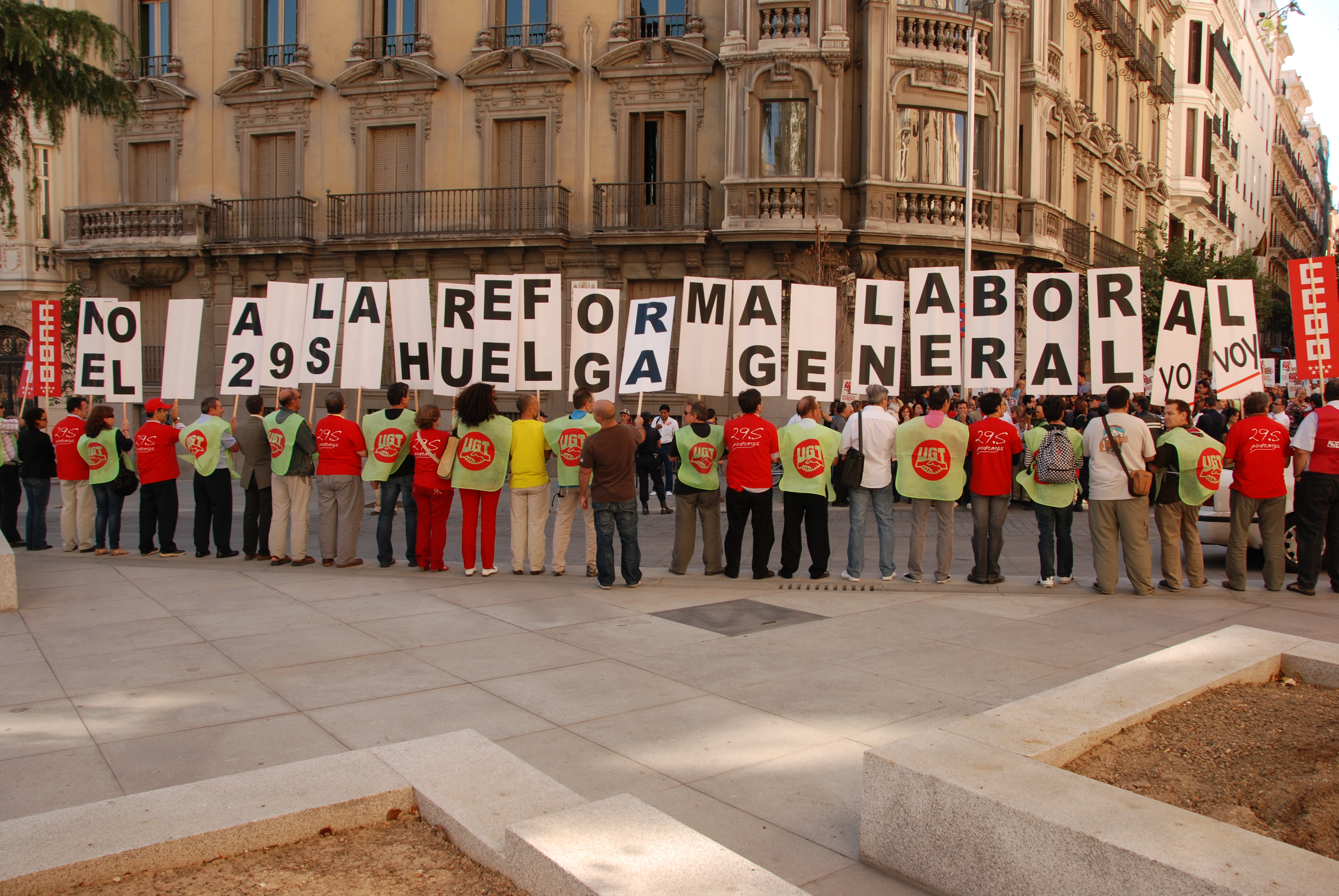 Líders sindicals d'UGT i Comissiones Obreres a favor de la vaga general contra la Reforma laboral d'Espanya de 2010.